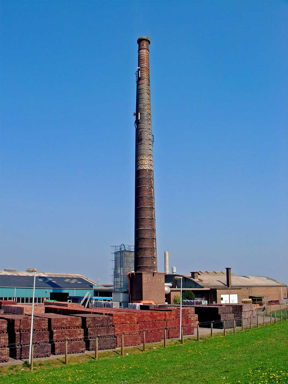 Steenfabriek nabij Tolkamer